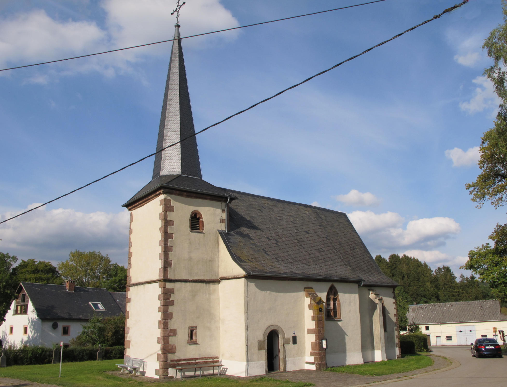 St-Eligius-Kulturkapelle Krewinkel, Manderfeld, Gemeinde Büllingen in Belgien